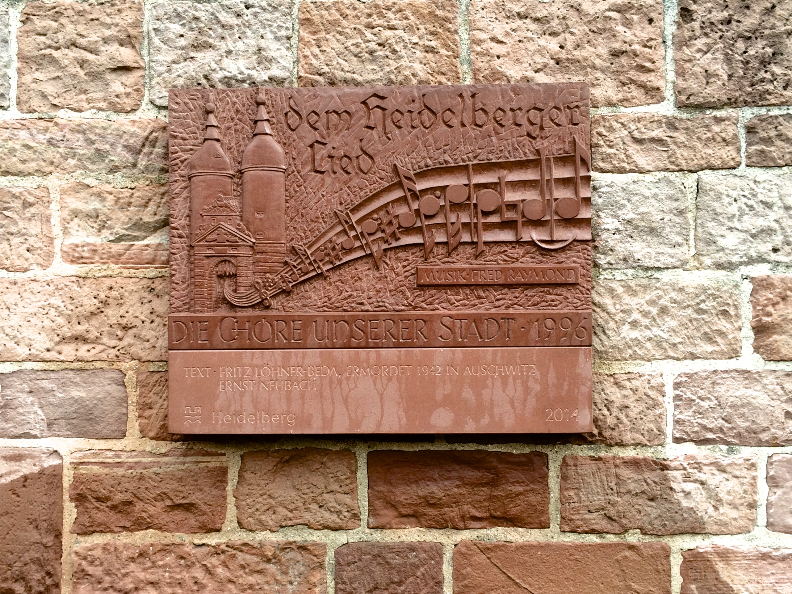 Steintafel Heidelberger Lied mit Ergänzungstafel "Text: Fritz Löhner und Ernst Neubach" am neuen Standort nördlich der Alten Brücke